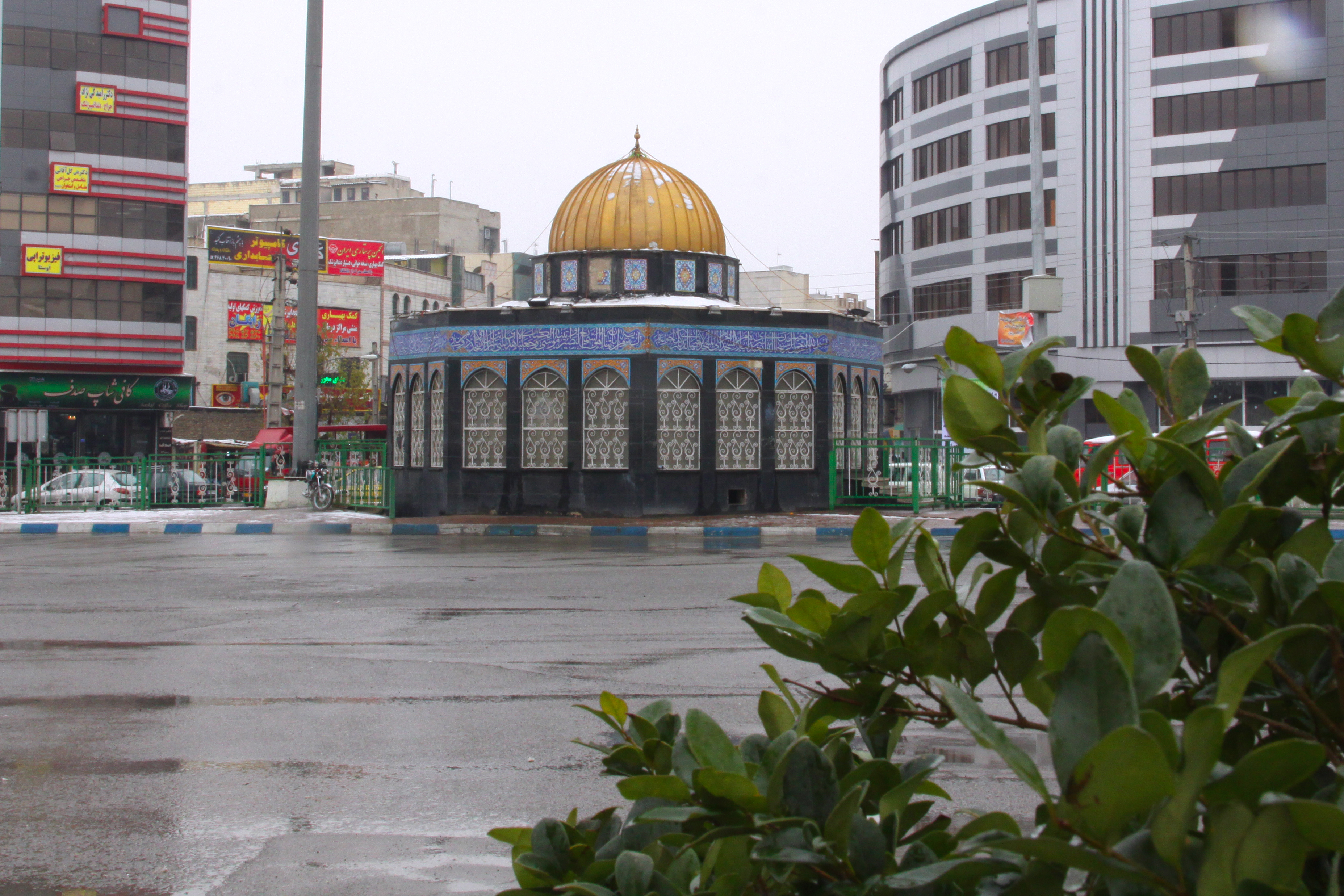 Ghods City / Tehran / Iran / Photo by: Alireza Habibi